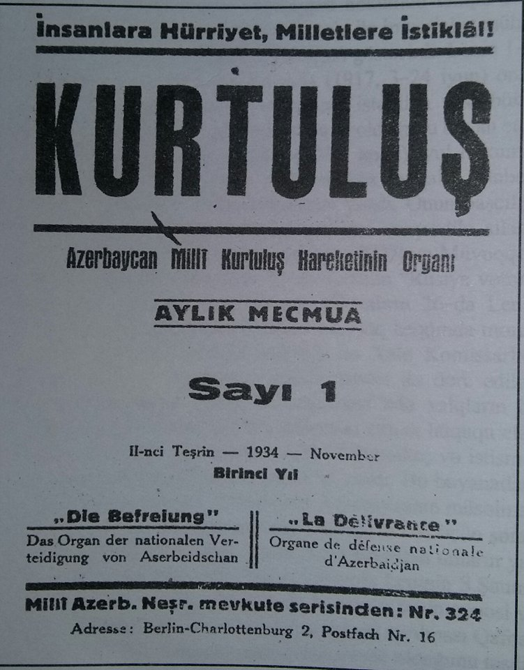 "Qurtuluş" toplusu (məcmuəsi)